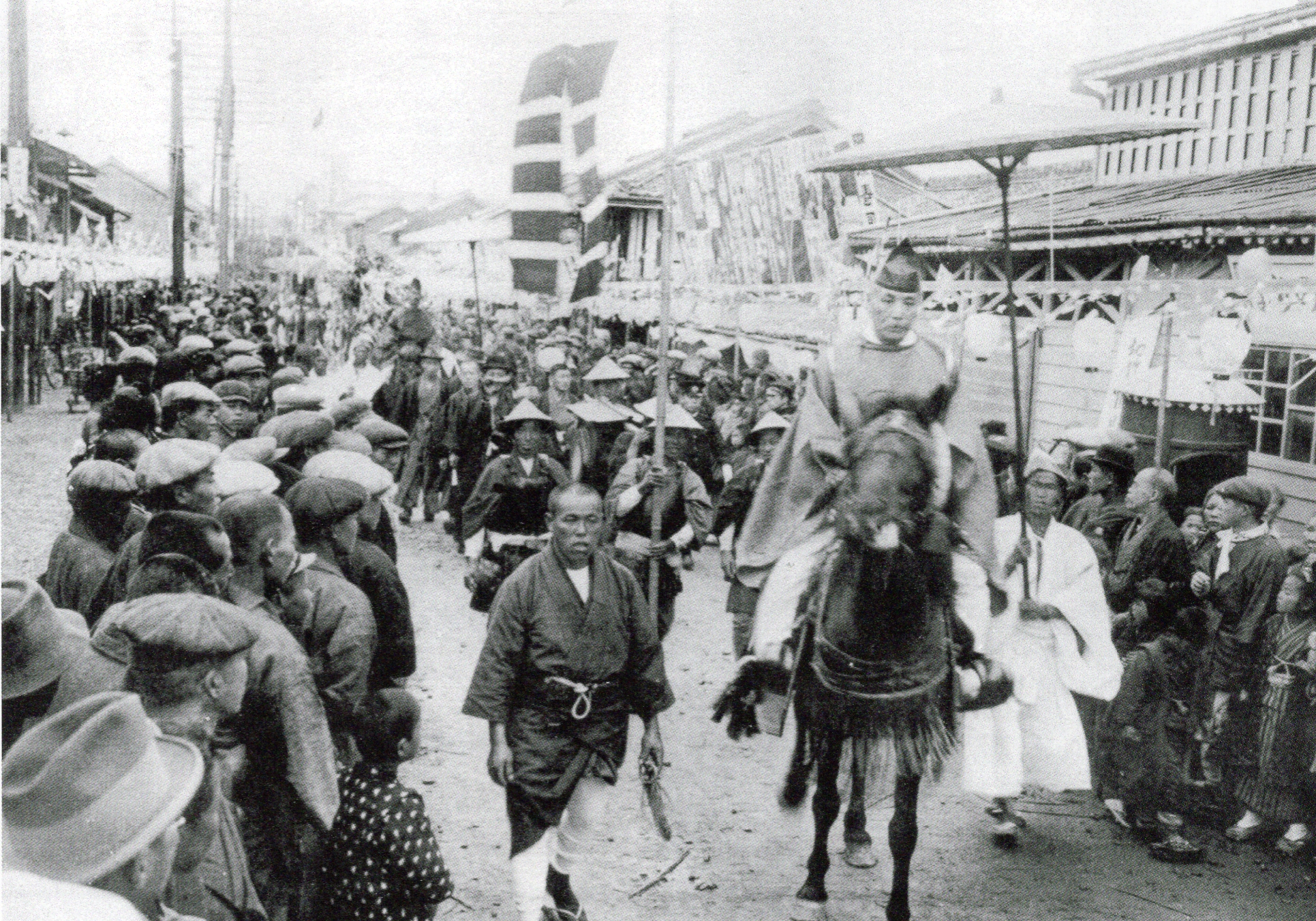 家康忠勝両公三百年祭（1915年4月）